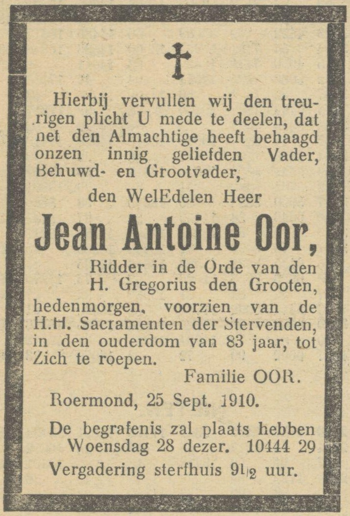 rouwadvertentie Jean Antoine Oor. Uit De Maasbode, dinsdag 27 september 1910, eerste blad, [p. 4].